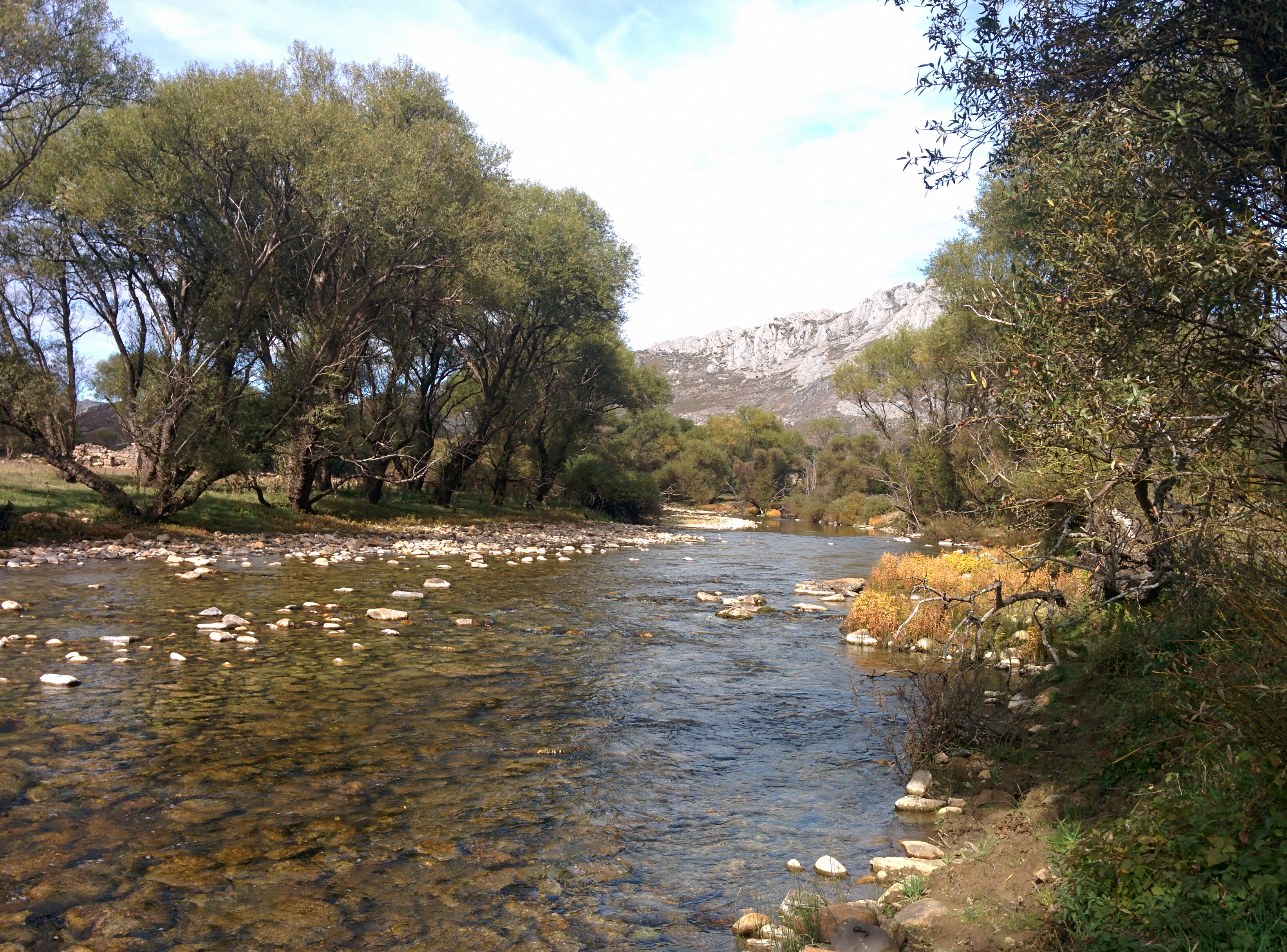 Río Luna en las cercanías de Santa Eulalia de las Manzanas (León, España).